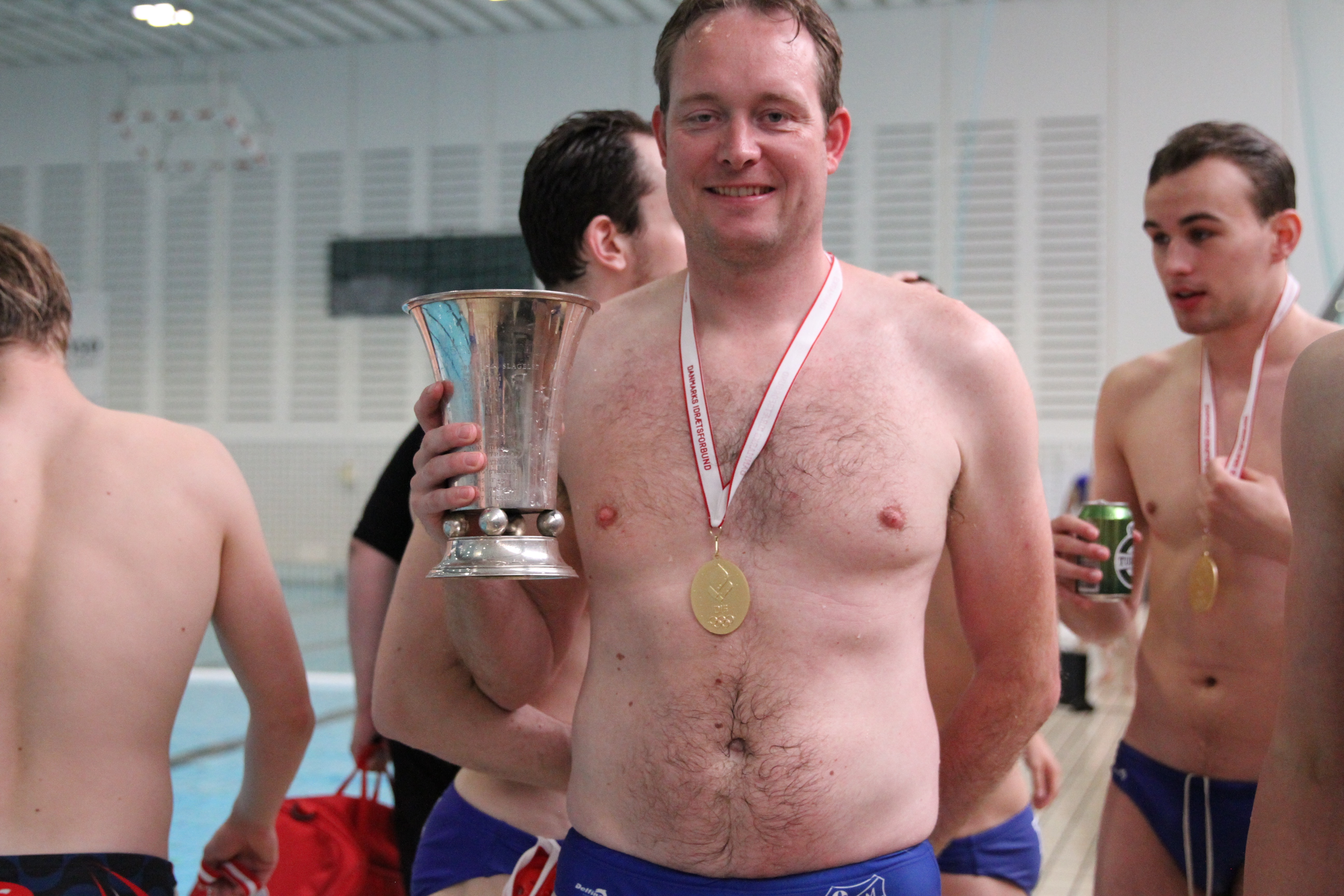 Michael Lang Harders 18. Danmarksmesterskab